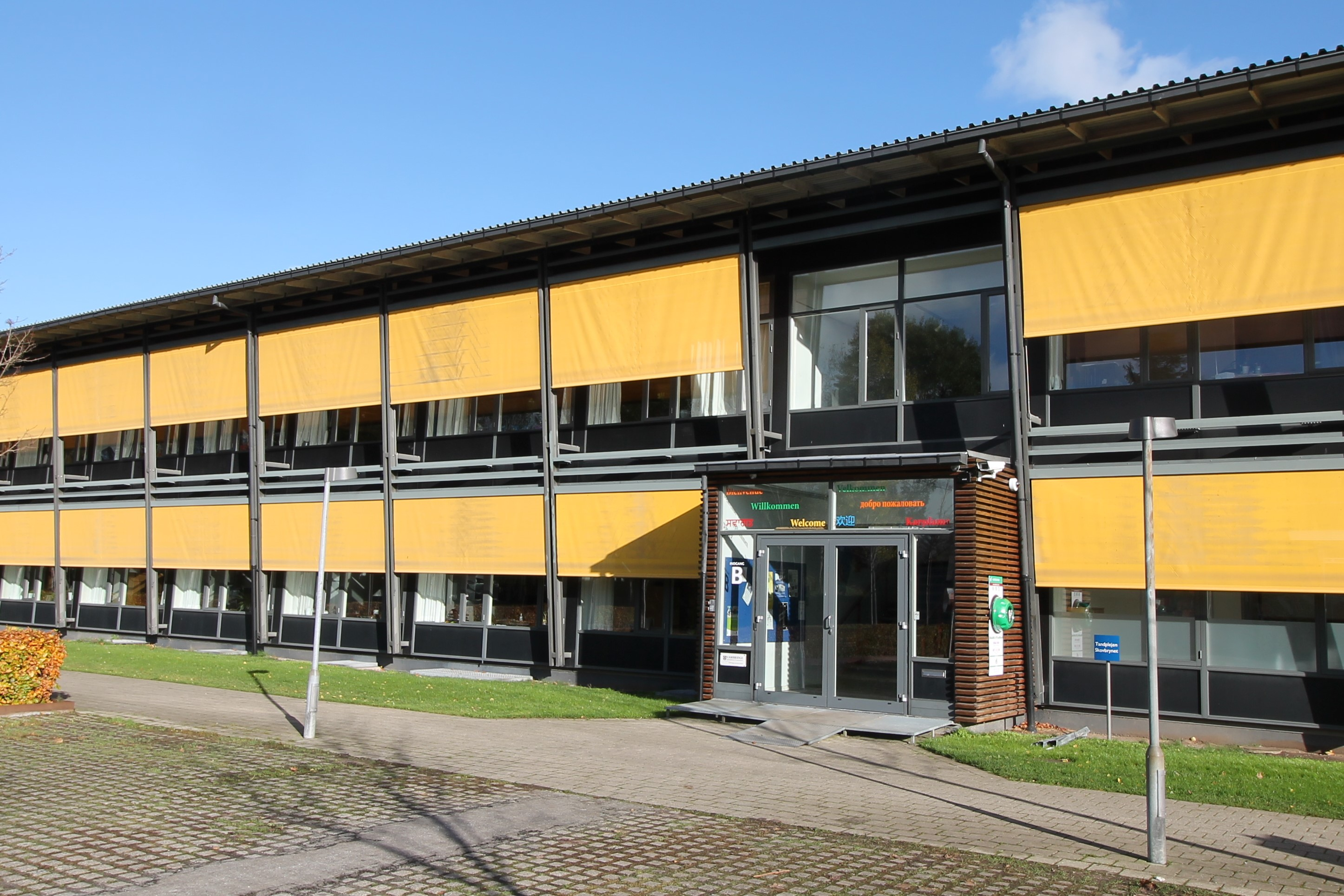 Skovbrynet skole (tidligere Værebro Skole)